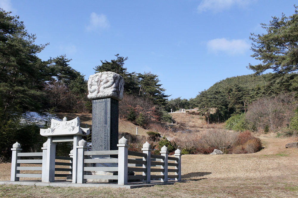 김인후 신도비 02